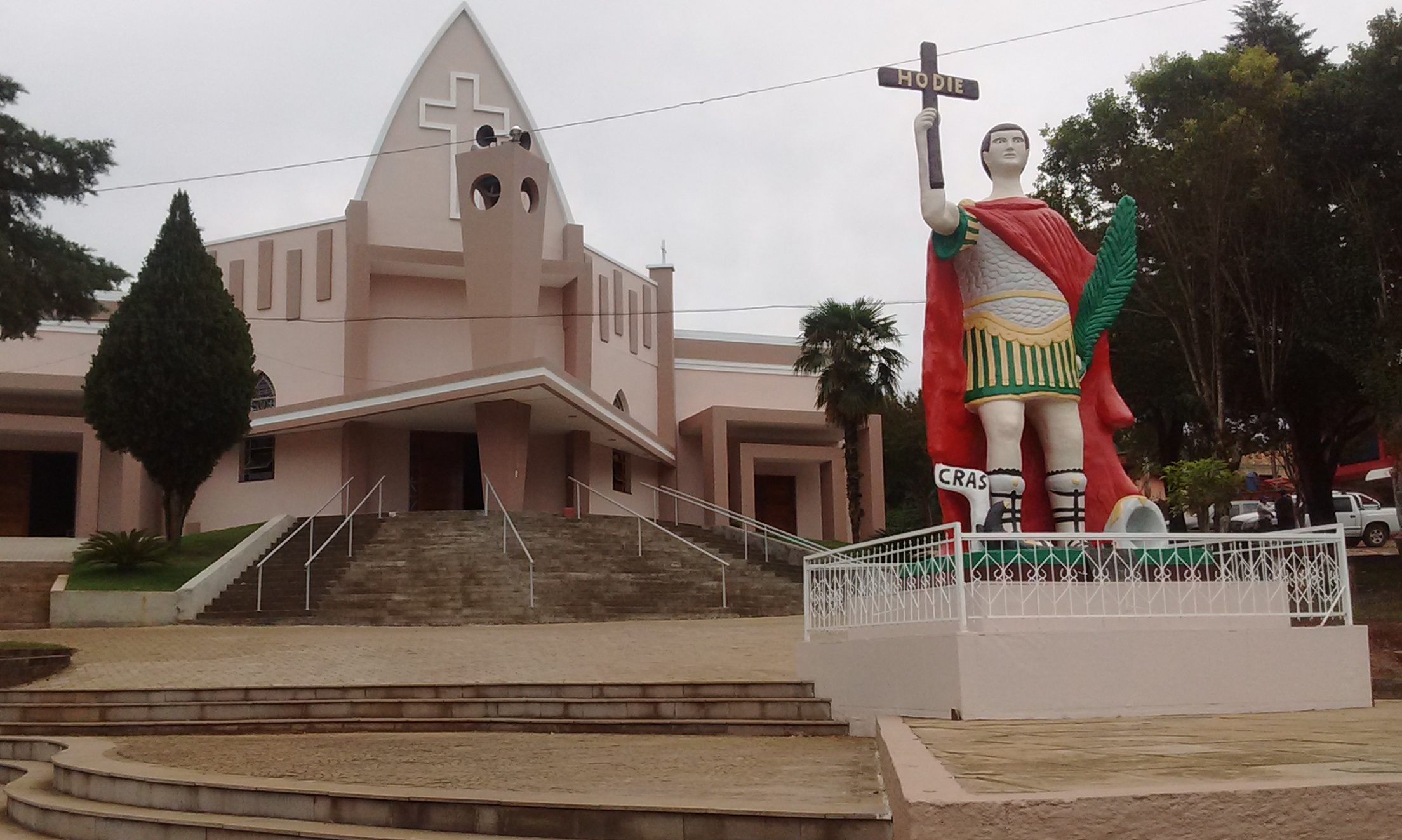 Santuário e monumento de Santo Expedito, localizados na Praça Central da cidade